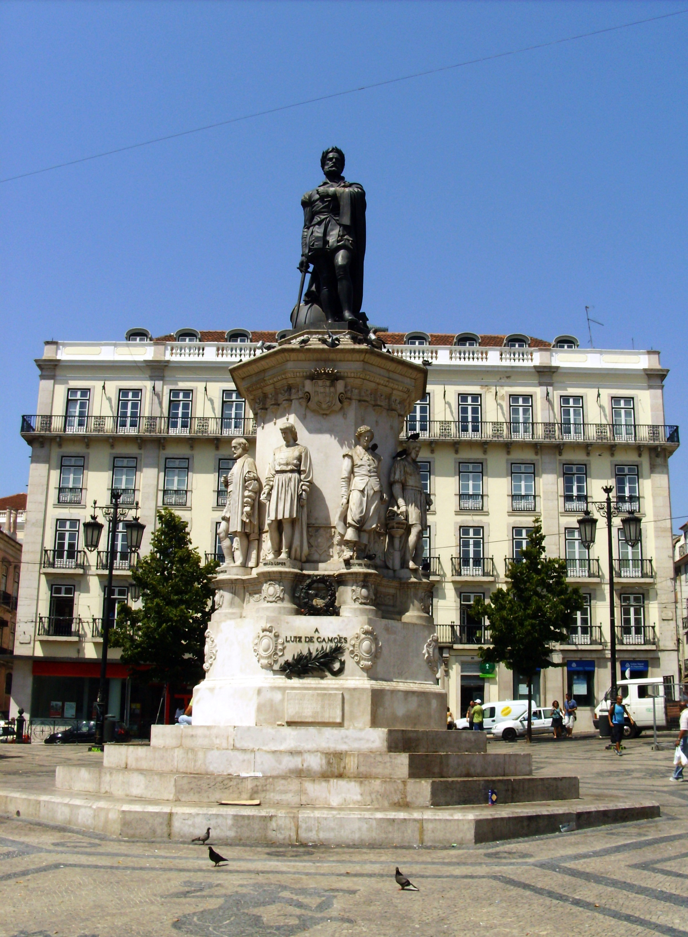 Estátua de Luís de Camões, na praça Luís de Camões, Bairro Alto, Lisboa; ao fundo o edifício onde se localiza o Consulado do Brasil em Lisboa.